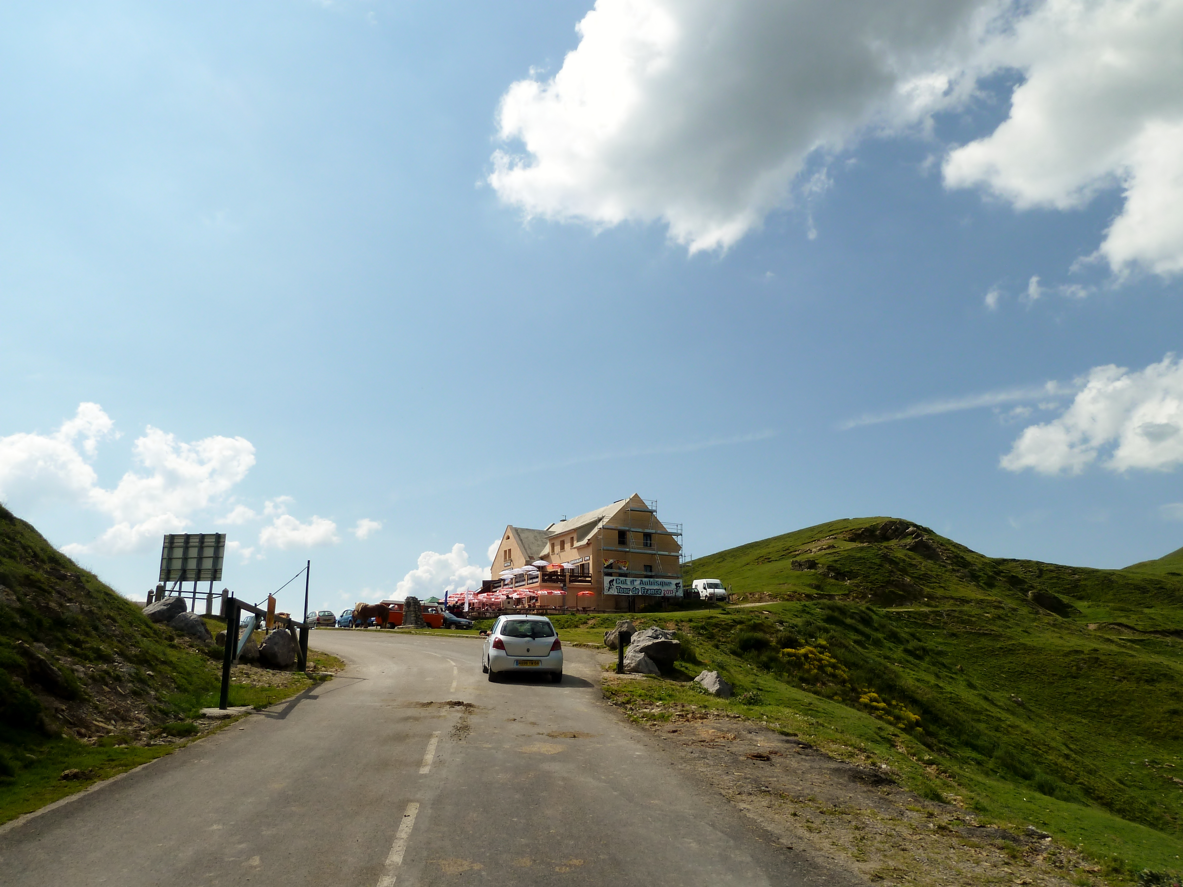 Col d'Aubisque 2011